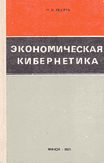 Сканированная обложка книги Н.И. Ведуты "Экономическая кибернетика"